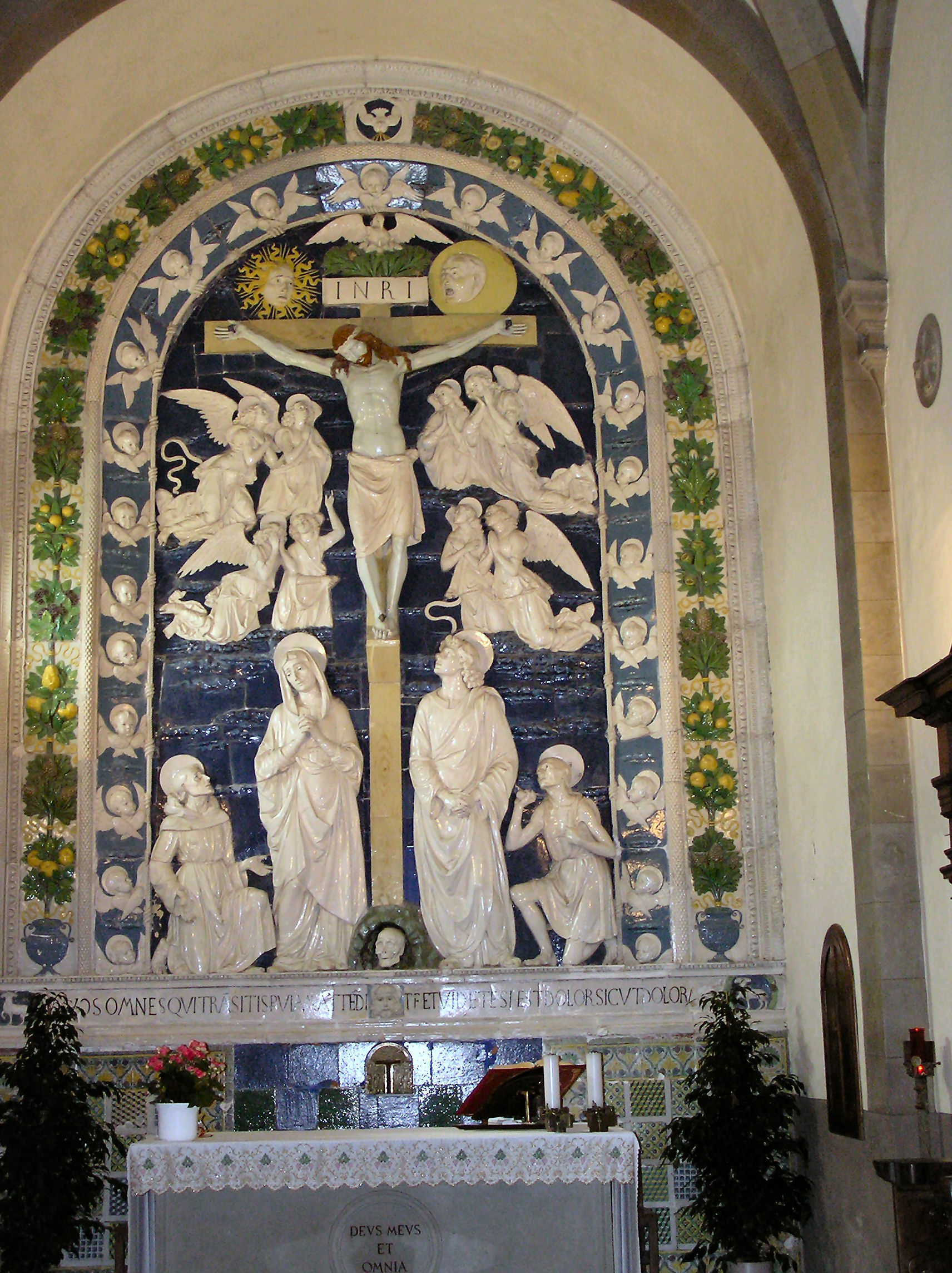 Andrea delle Robbia, Crucifixion, La Verna